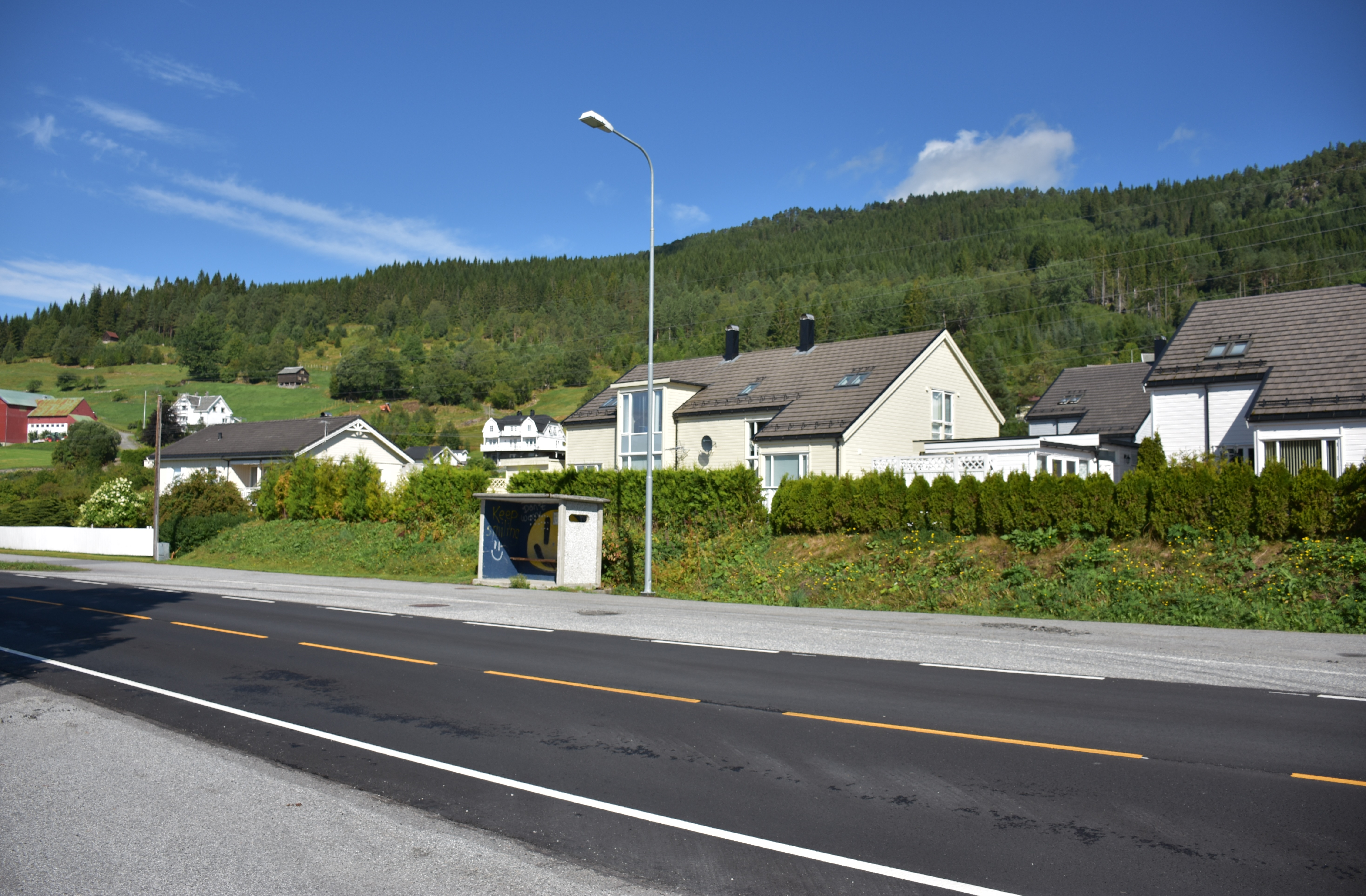 Skodjevegen (fylkesvei 661)